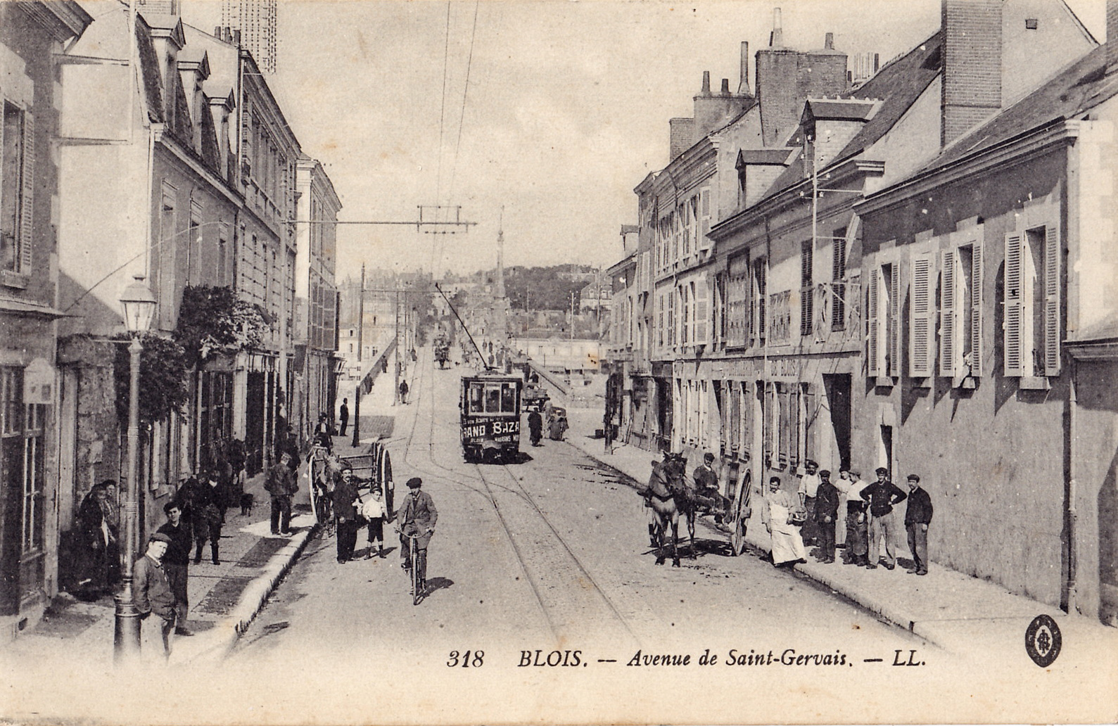 Carte postale ancienne éditée par LL, n°318 : BLOIS - Avenue de Saint-Gervais